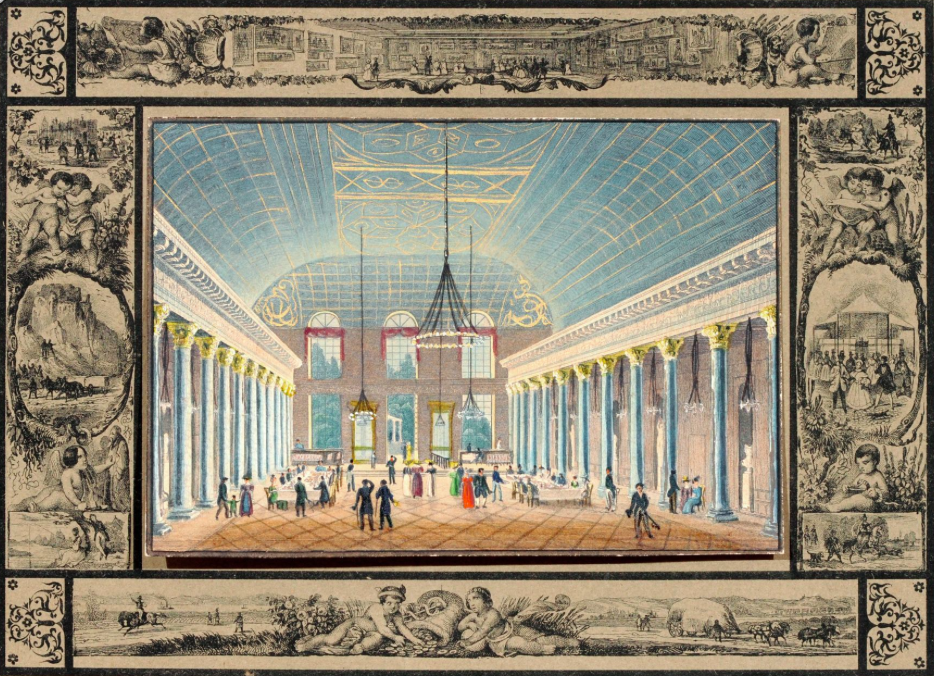 Ernst Friedrich Grünewald: Das Innere des Cursaals zu Wiesbaden, kolorierter Stahlstich, 20 x 24,5 cm, Privatsammlung Wiesbaden.